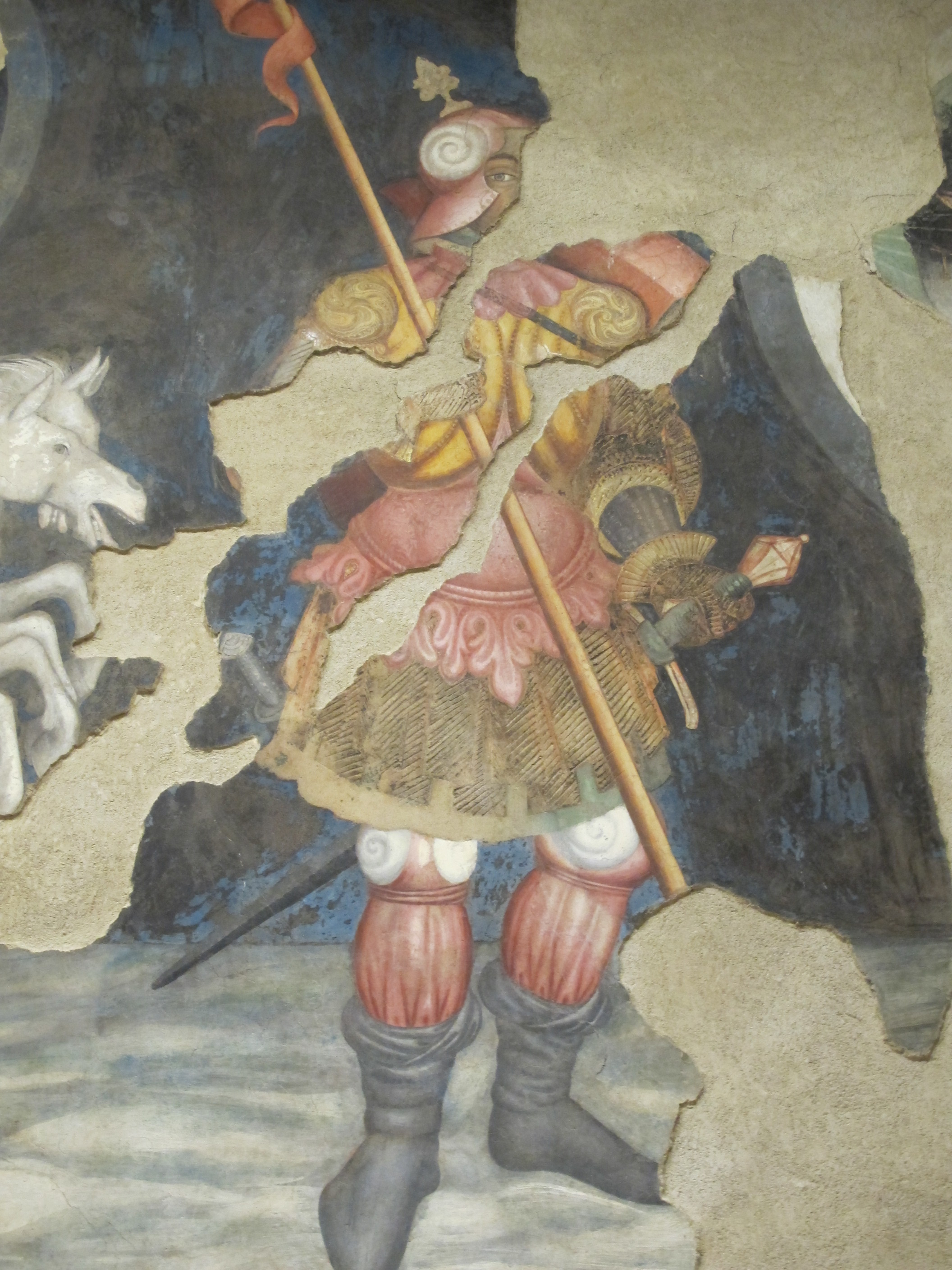 Sala delle arti liberali e dei pianeti 21 marte